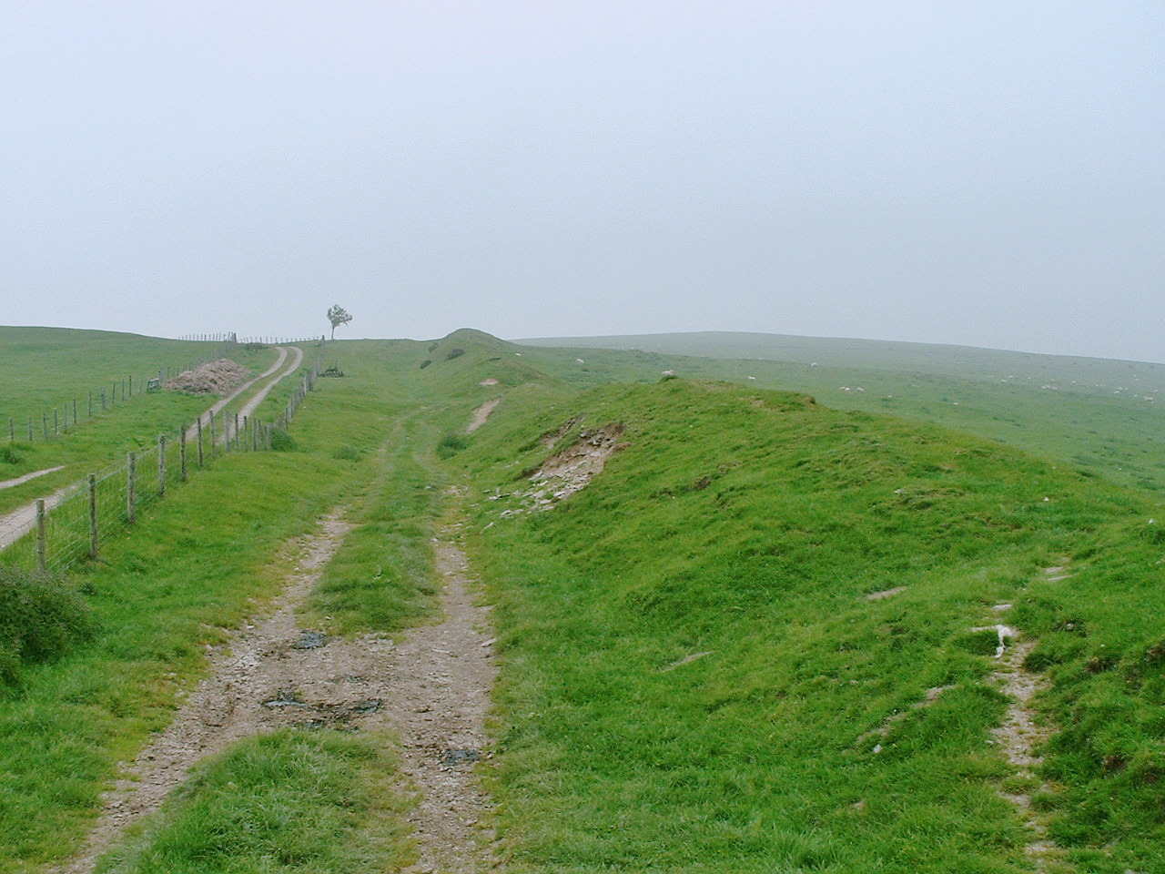 Eigen opname